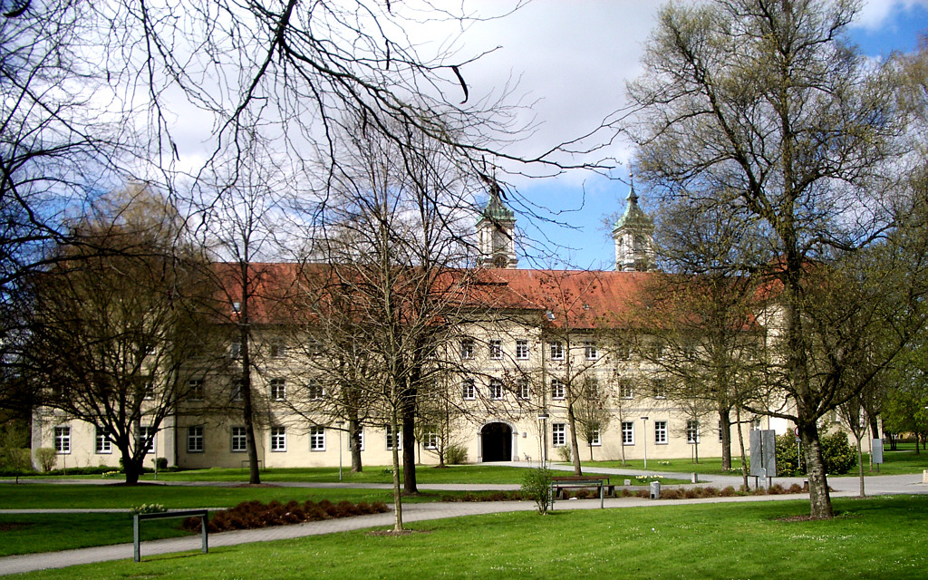 Ravensburg, Kloster Weißenau: Konventsgebäude von Osten